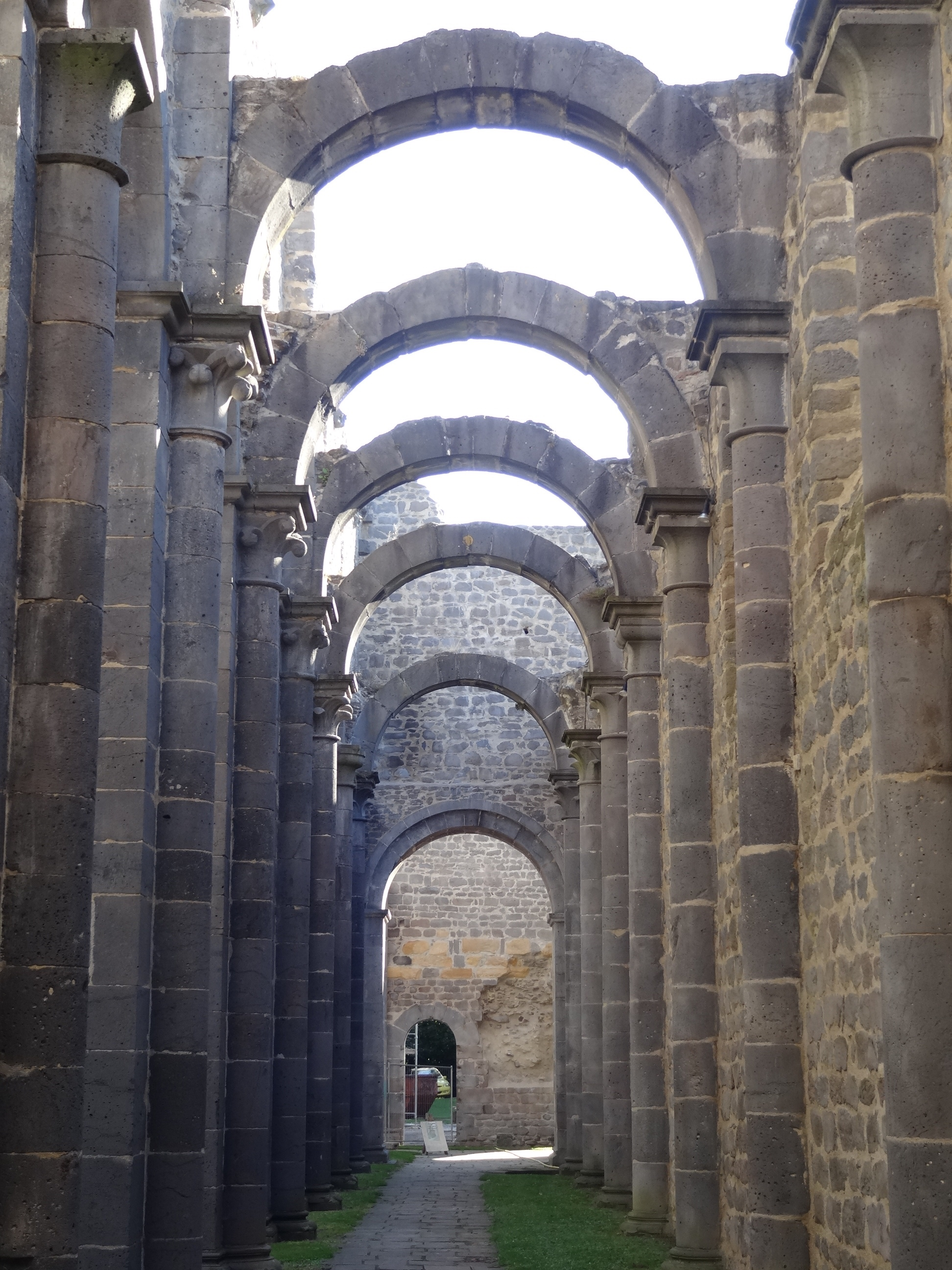 Kloster Arnsburg (Klosterkirche)